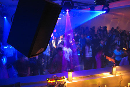 la boîte de nuit à Tokyo, Vanilla